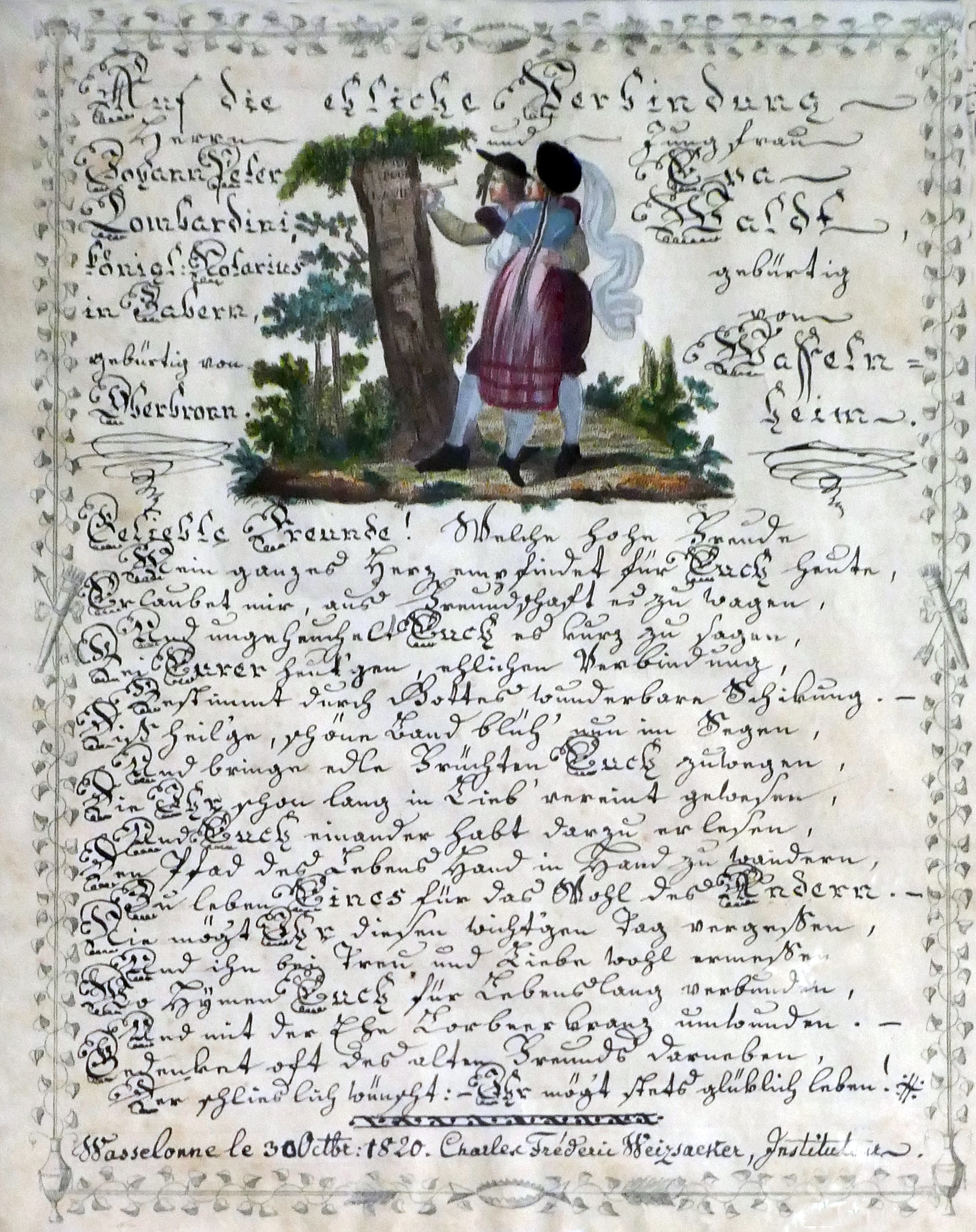 Voeux pour le mariage de Johann Peter Lombardini d'Oberbronn, notaire royal à Saverne, et d'Eva Waldt de Wasselonne. Le texte a été rédigé en 1820 par Charles Frédéric Weizsacher, instituteur et ami des mariés. Exposition Vies protestantes : le mot et l'image au Musée alsacien de Strasbourg (2017).